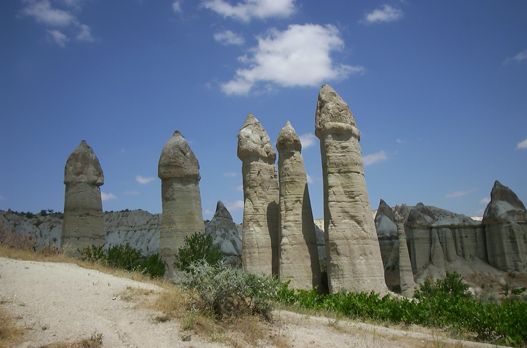 Cheminées de fée à Üçhisar, province de Nevşehir, Cappadoce, Turquie. Photographie personnelle.